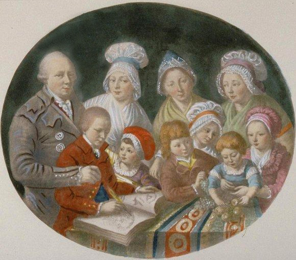 La famille Sorg-Ferrazino de Strasbourg . Bibliothèque nationale et universitaire de Strasbourg